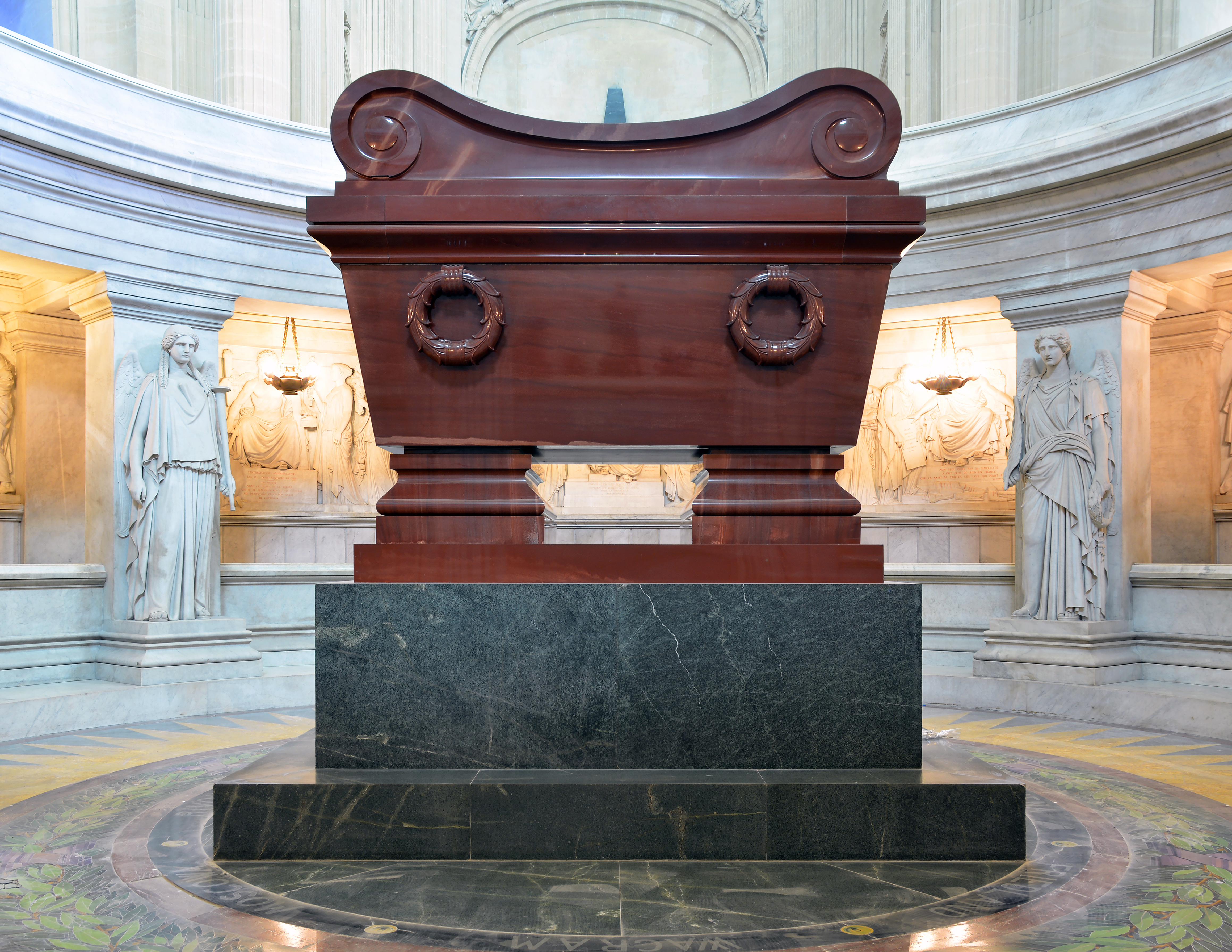 Napoleone Bonaparte's Tomb